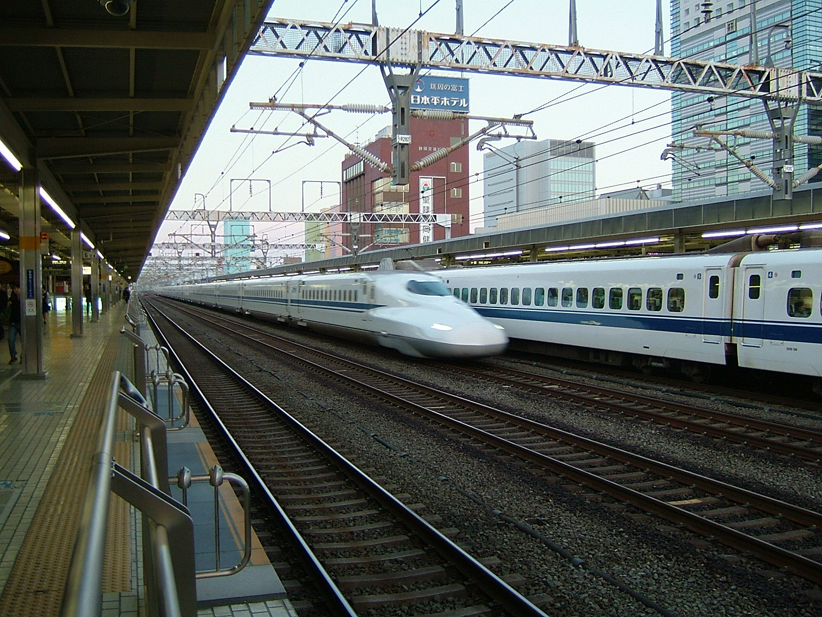 静岡駅を通過するN７００系（上りホームより撮影）